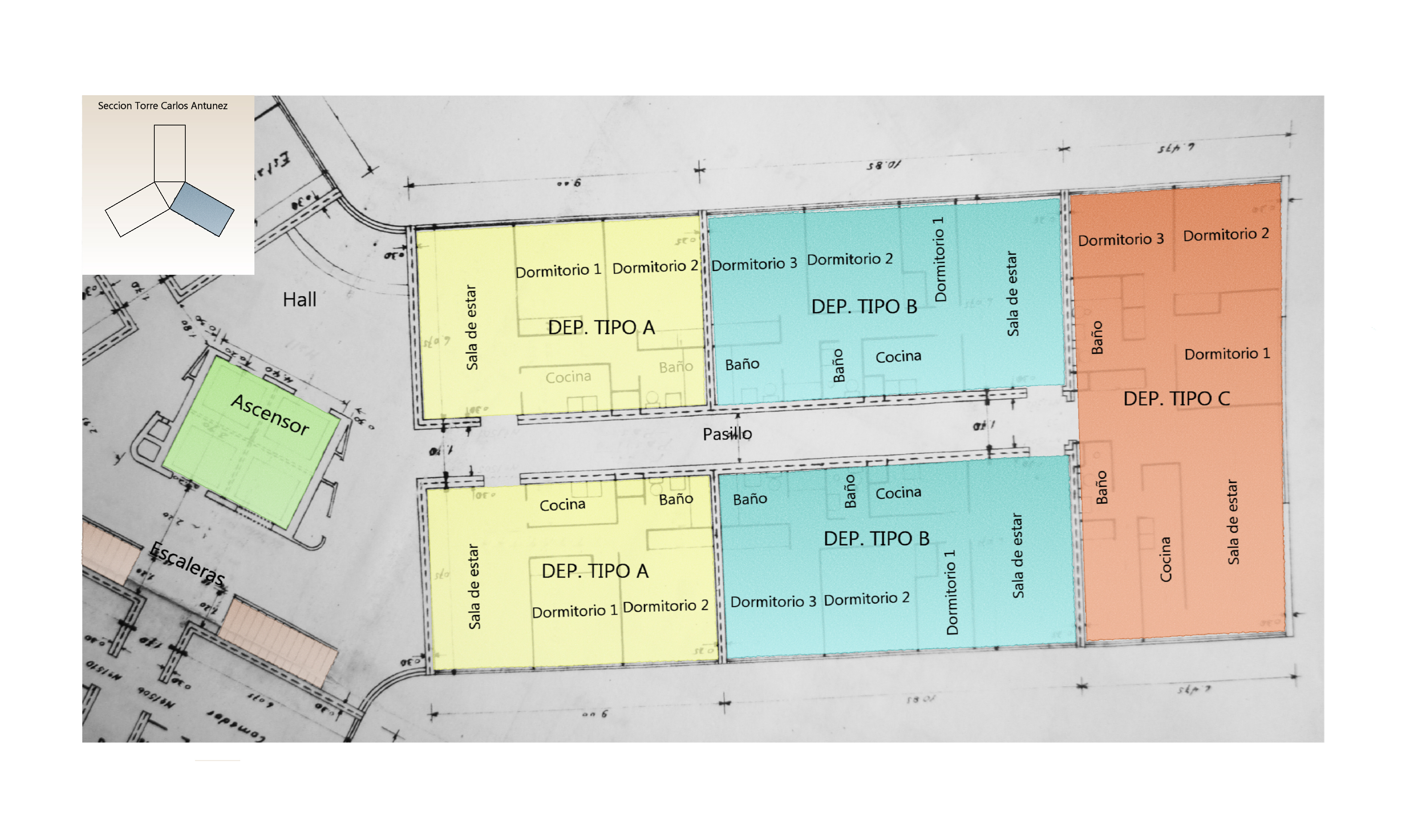 Existen tres tipos de departamentos. Departamento tipo A (en amarillo), Departamento tipo B (en azul) y Departamento tipo C (en rojo)